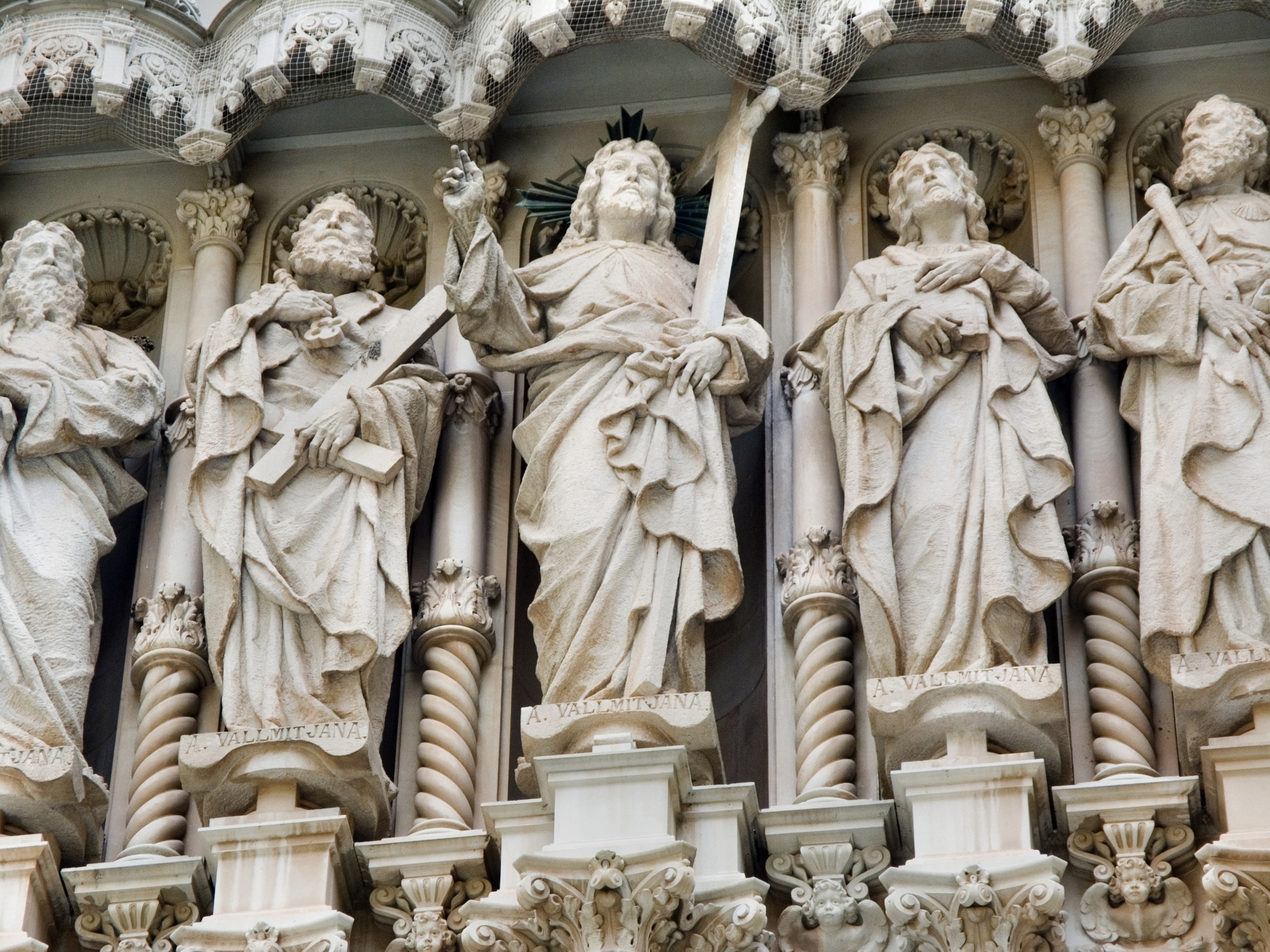 Каталония, монастырь Монсеррат – Базилика Девы Марии